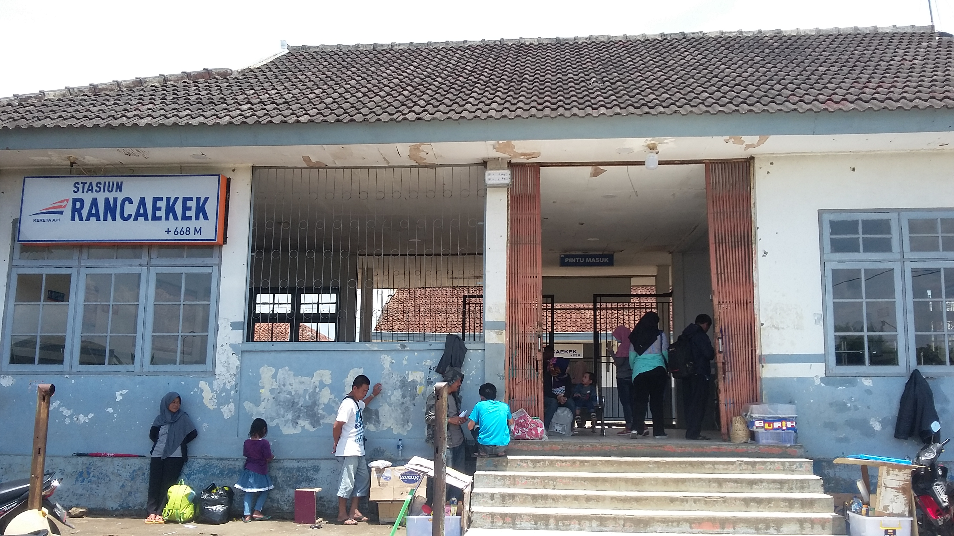 Stasiun Rancaekek pintu selatan